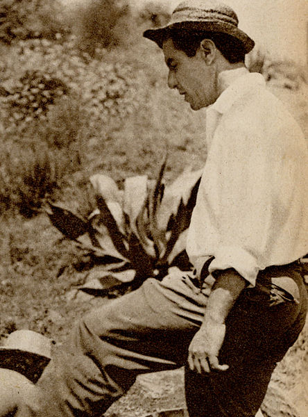 photo from the Italian magazine Almanacco Cinema italiano (1952)